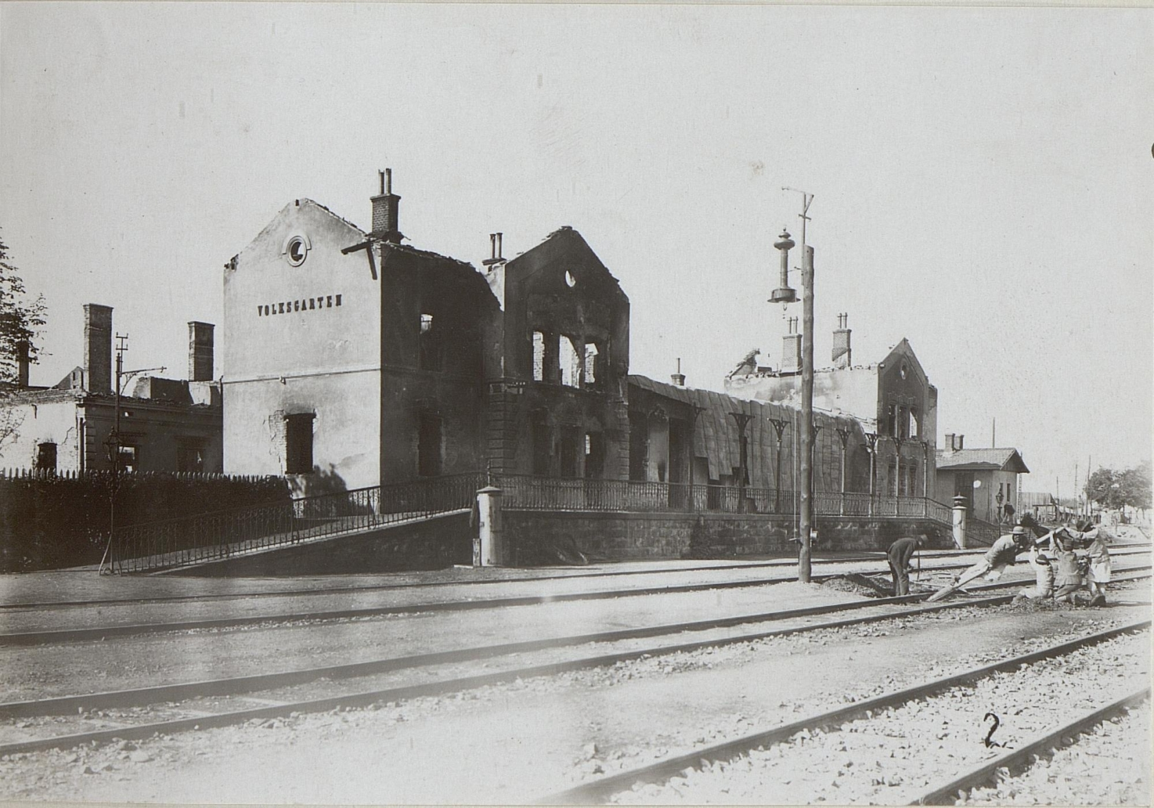 Station Volksgarten Czernowitz